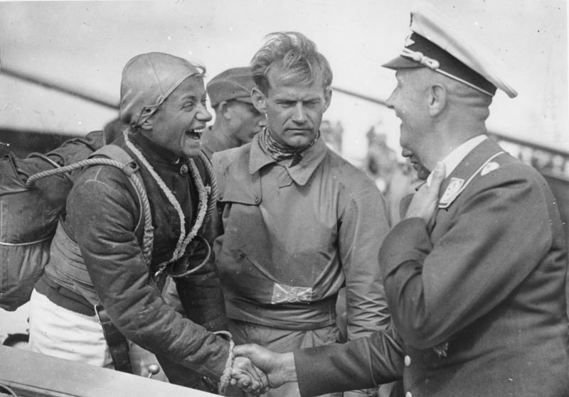 Scherl Bilderdienst Deutschlands Segelflieger auf der Rhön. Reichsluftsportführer Oberst Mahnke stattete gestern, den 27.8.36, den Segelfliegern auf der Wasserkuppe einen Besuch ab. Hier begrüßt er die bekannte Segelfliegerin Hanna Reitsch, die einzige weibliche Teilnehmerin des Wettbewerbs. 27.8.36 Bildber.: v.d.Becke 202-36 ADN/ZB-Archiv 12603-36 Hanna Reitsch beim Segelflug-Wettbewerb 1936 Bei der deutschen Segelflug-Wettbewerb 1936 auf der Wasserkuppe in der Rhön war Hanna Reitsch (l.) die einzige weibliche Teilnehmerin. Hier wird sie vom "Reichsluftsportführer" Oberst Mahnke (r.) begrüßt. (27.8.36 - v.d. Becke)